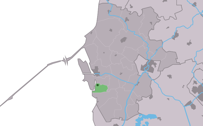 Kaartsje fan himrik fan Piaam